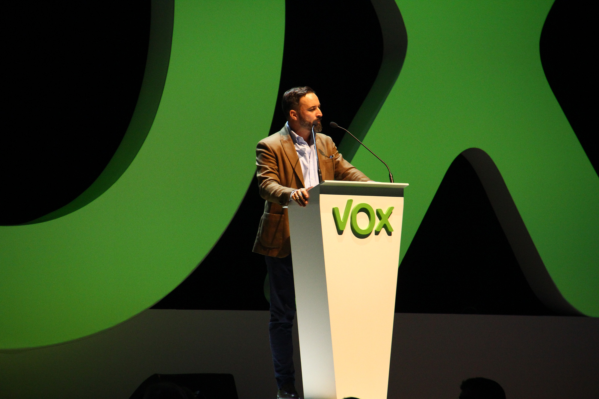 Acto de Vox en Vistalegre